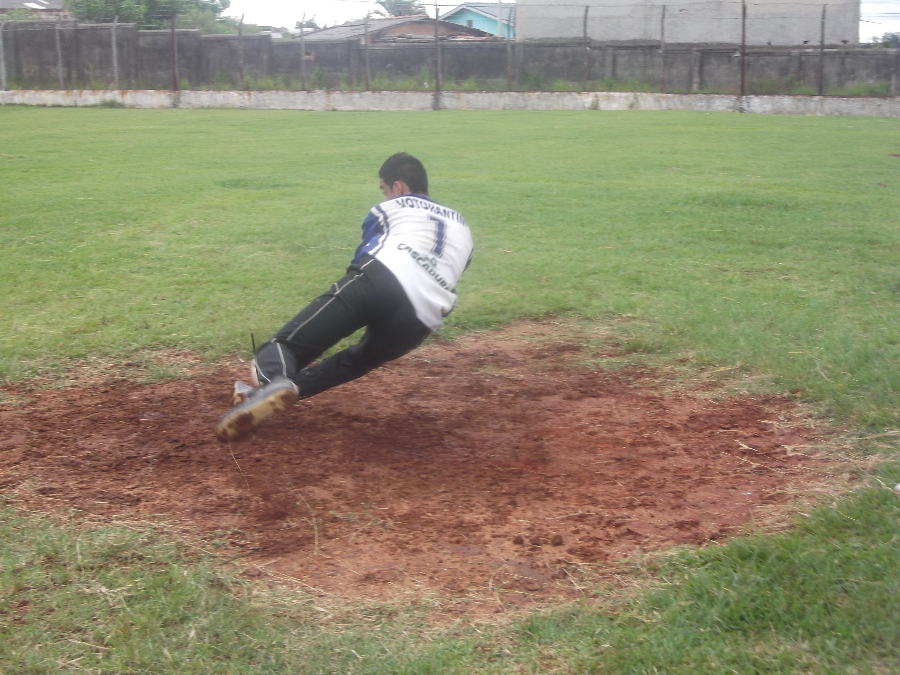 Goleiro em Treinamento na Associação Desportiva Social Votorantim